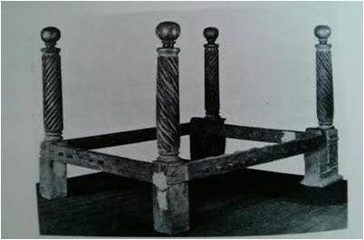 Llit